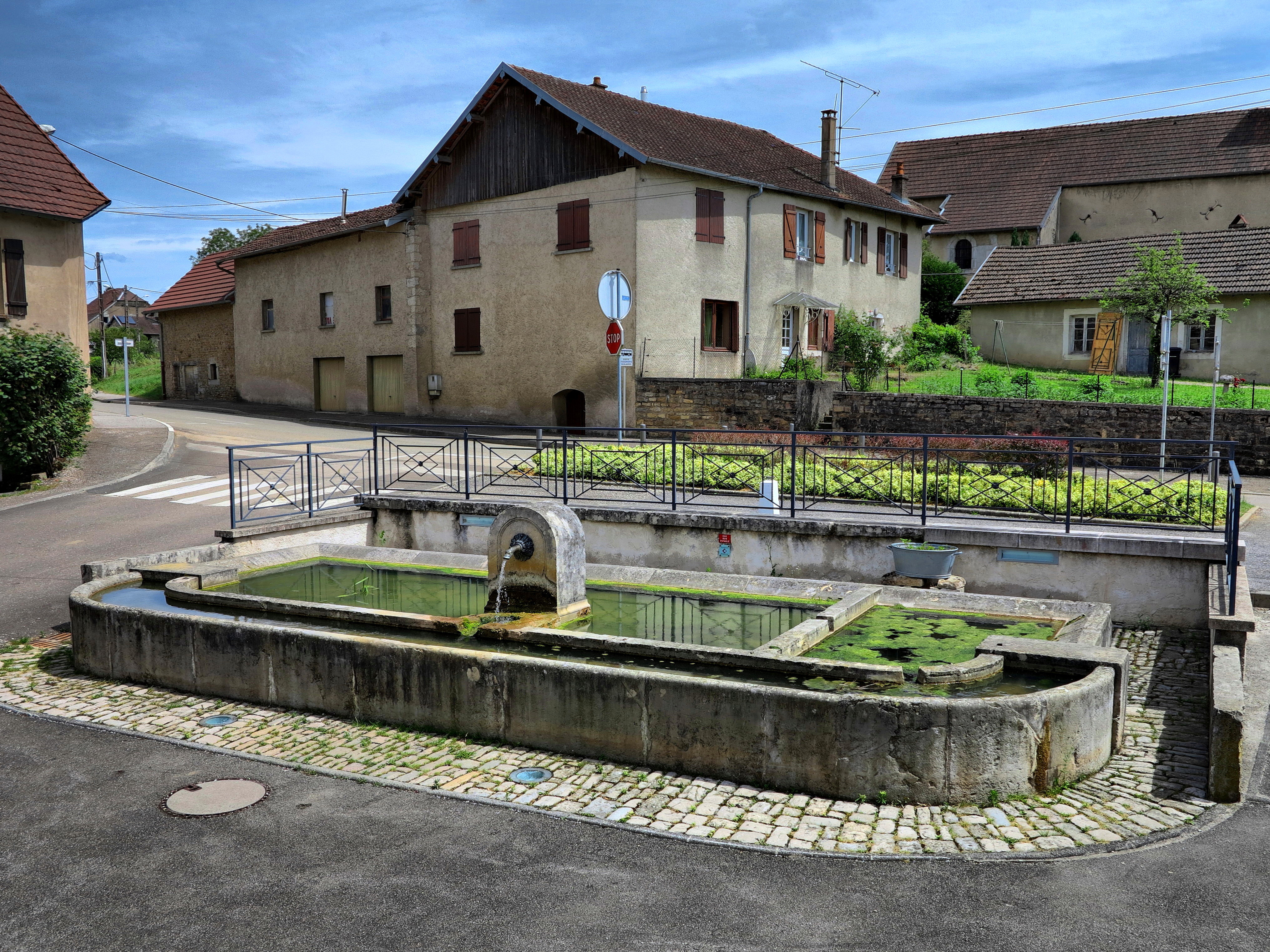 Le lavoir-abreuvoir